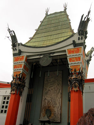 好萊塢星光大道的起點，中國戲院大門 中國戲院原本是美國加州洛杉磯好萊塢地區一系列由 席德·格勞門| (Sid Grauman)所開設的連鎖戲院中的一家，位於好萊塢大道6925號，它的門口是知名的「星光大道」的起點，許多世界知名的好萊塢名人們都在這裡留下他們的手印與腳印，而代表每個演藝事業從業人員的星星，也由這裡一路沿路邊排列到好幾條街之外。 本圖片由上傳者User:SElephant拍攝於2003年2月。